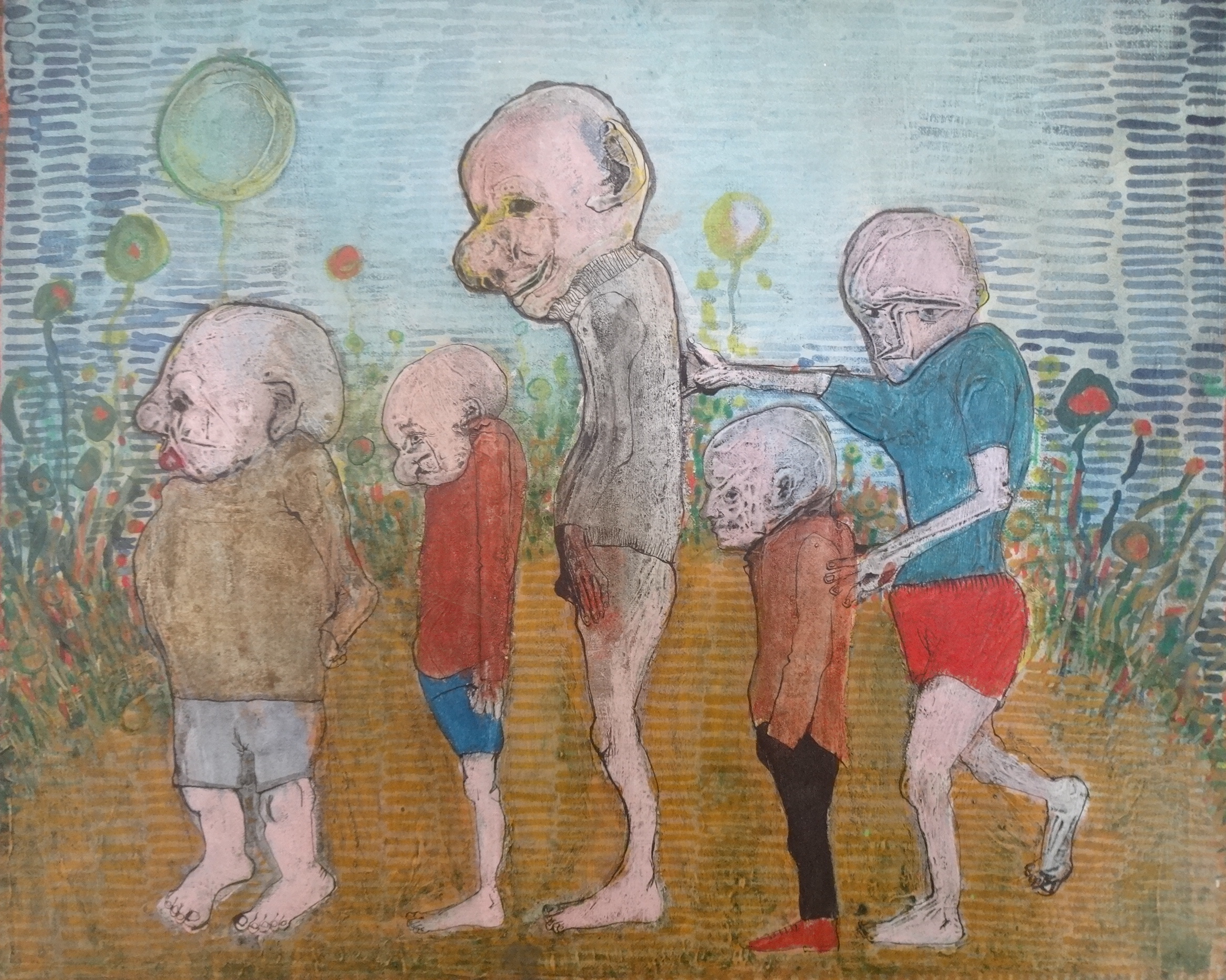 Obraz pt. Ścieżka zdrowia, namalowany przez Tadeusza Brudzyńskiego w czasie studiów na ASP